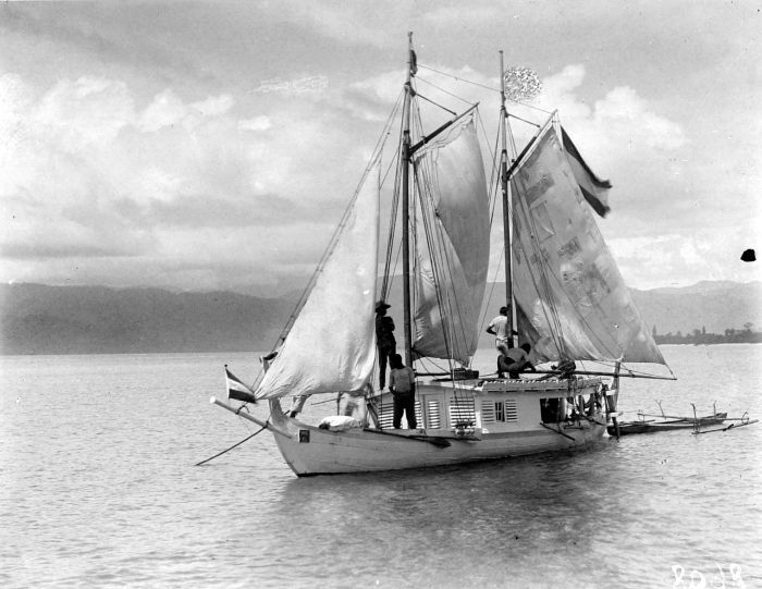 Repronegatief. Orembai in de baai van Elpapoetih, Zuid-Ceram